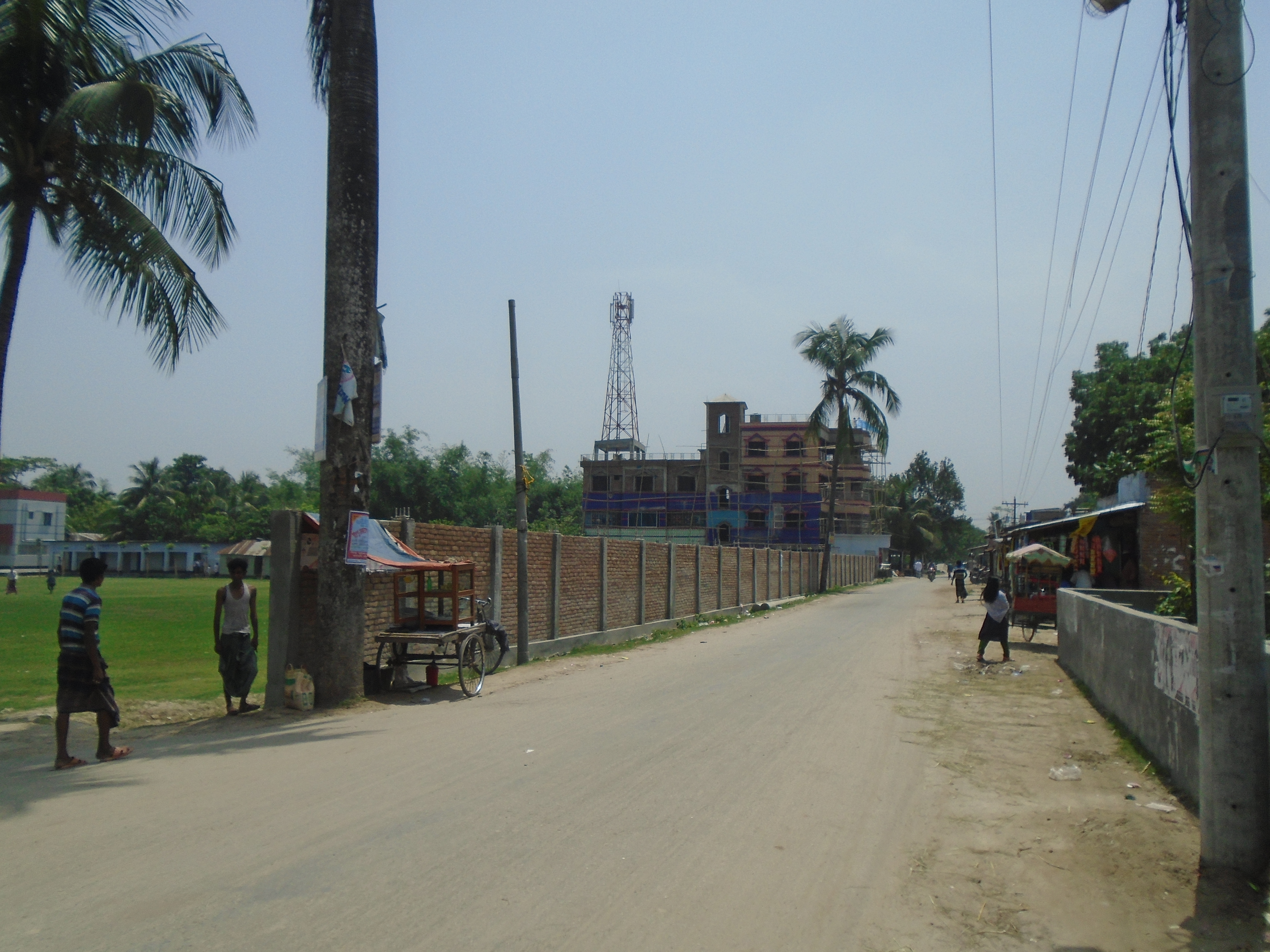 মহিষকুন্ডি মাধ্যমিক বিদ্যালয়ের সামনের রাস্তা